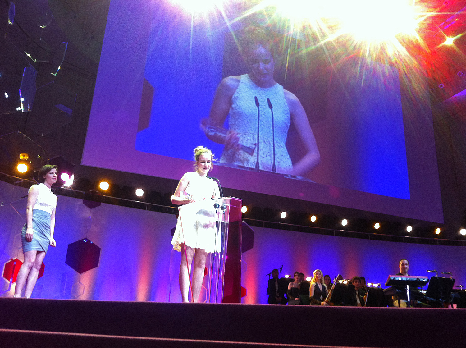 Schweizer Filmpreis "Quartz" 2012 Carla Juri, Beste Darstellerin "Eine wen iig, dr Dällebach Kari"